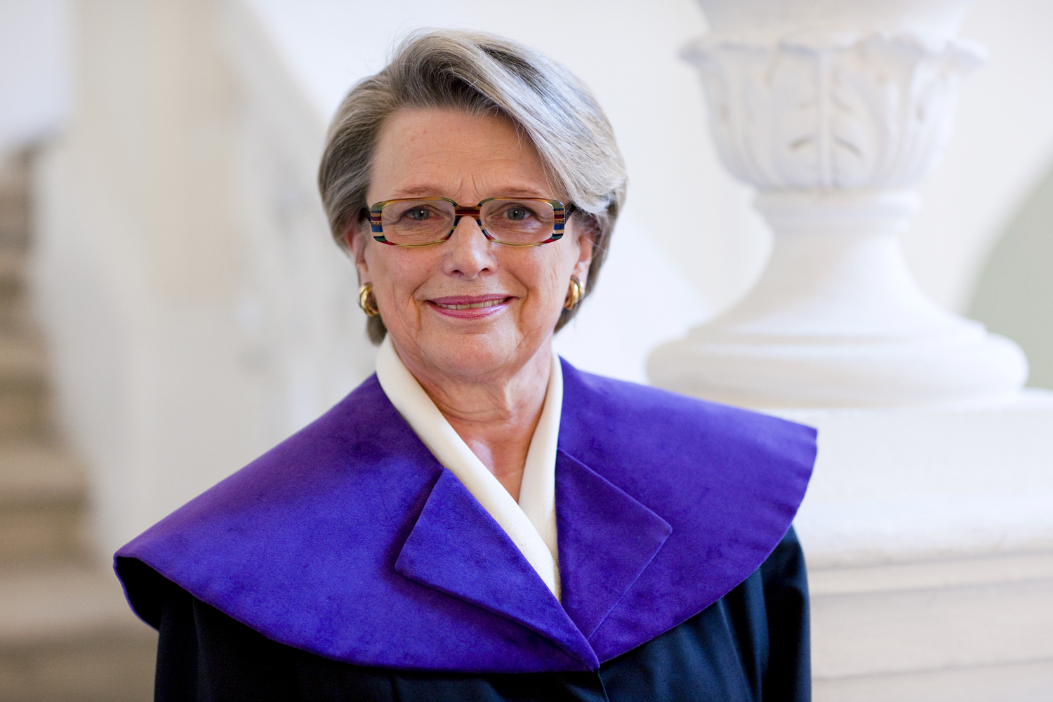 Mag. Dr. Eleonore Berchtold-Ostermann, Mitglied des österreichischen Verfassungsgerichtshofs seit 1997.